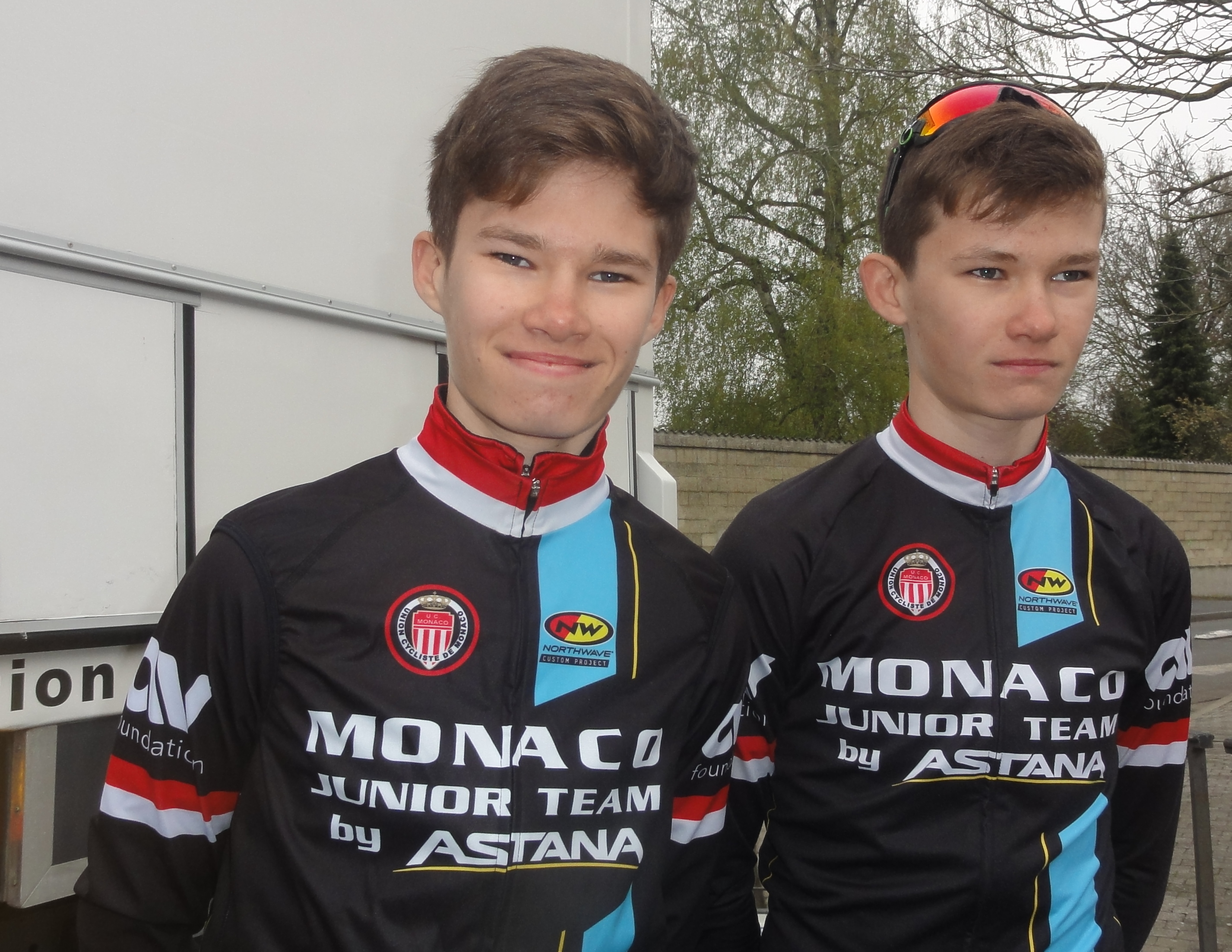 Reportage réalisé le dimanche 14 avril à l'occasion du départ du Paris-Roubaix juniors 2019 à Saint-Amand-les-Eaux, France.